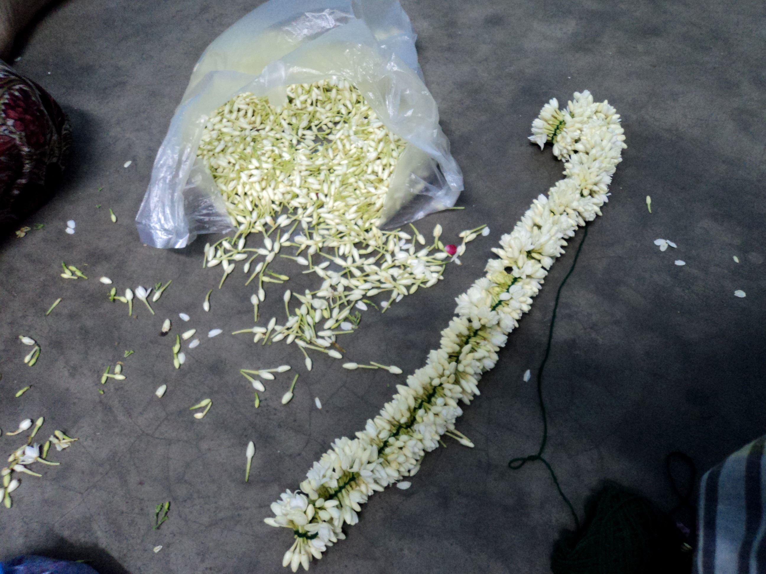 the garland,jasmine,Tamil Nadu